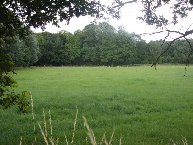 Naturschutzgebiet „Garbeeke“